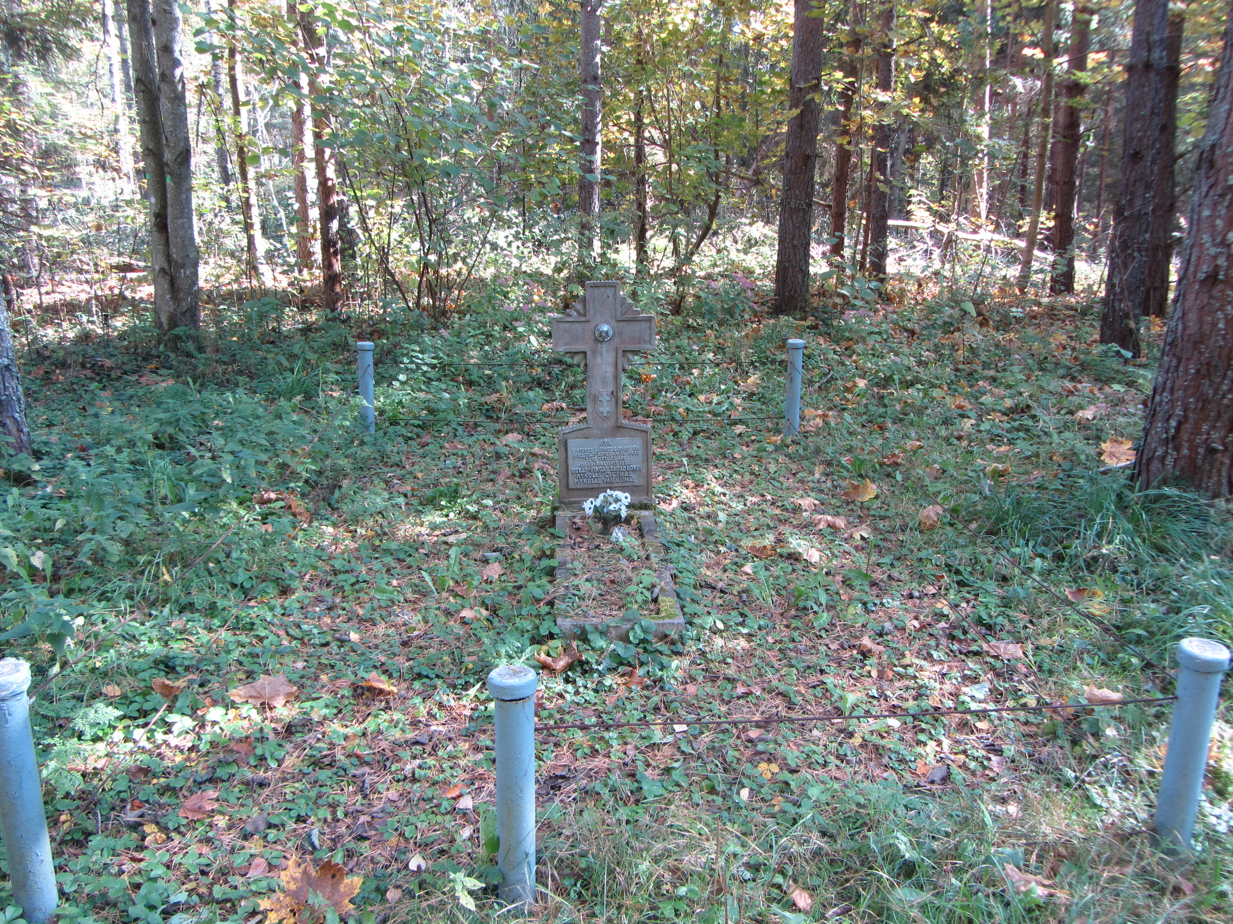 Švenčionių sen., Lithuania